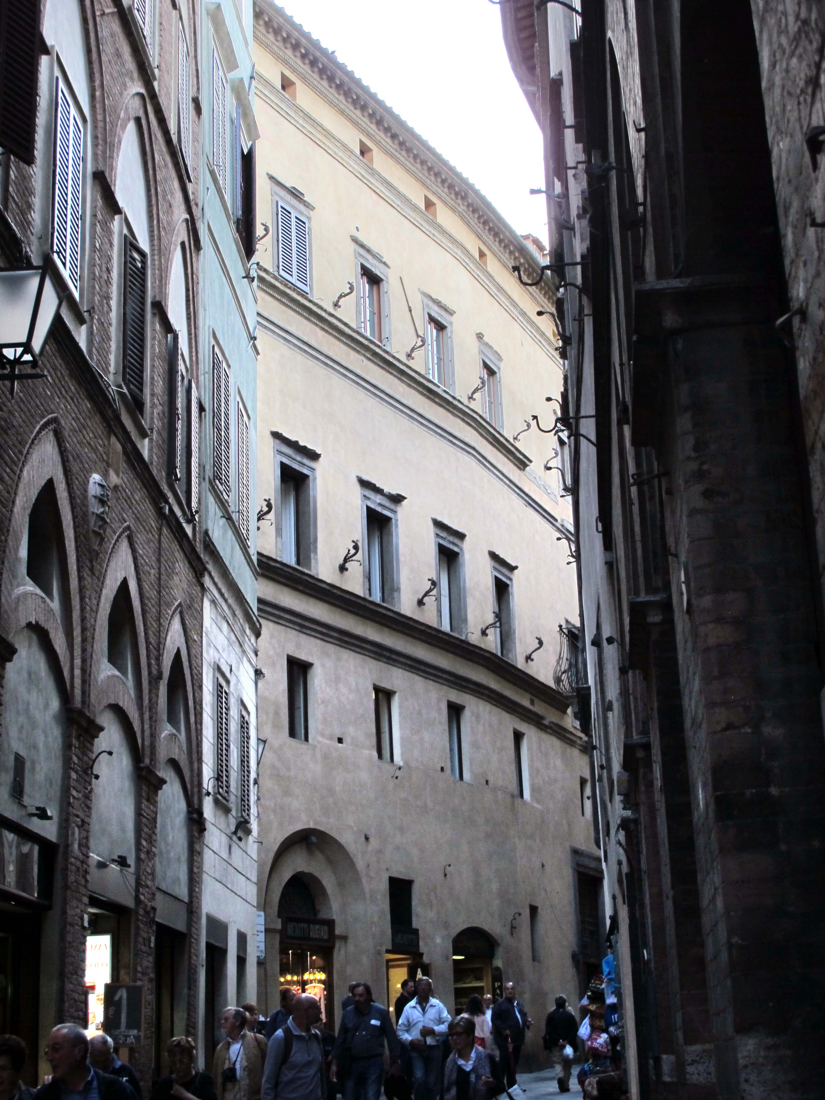 Via dei Pellegrini e dintorni, Siena